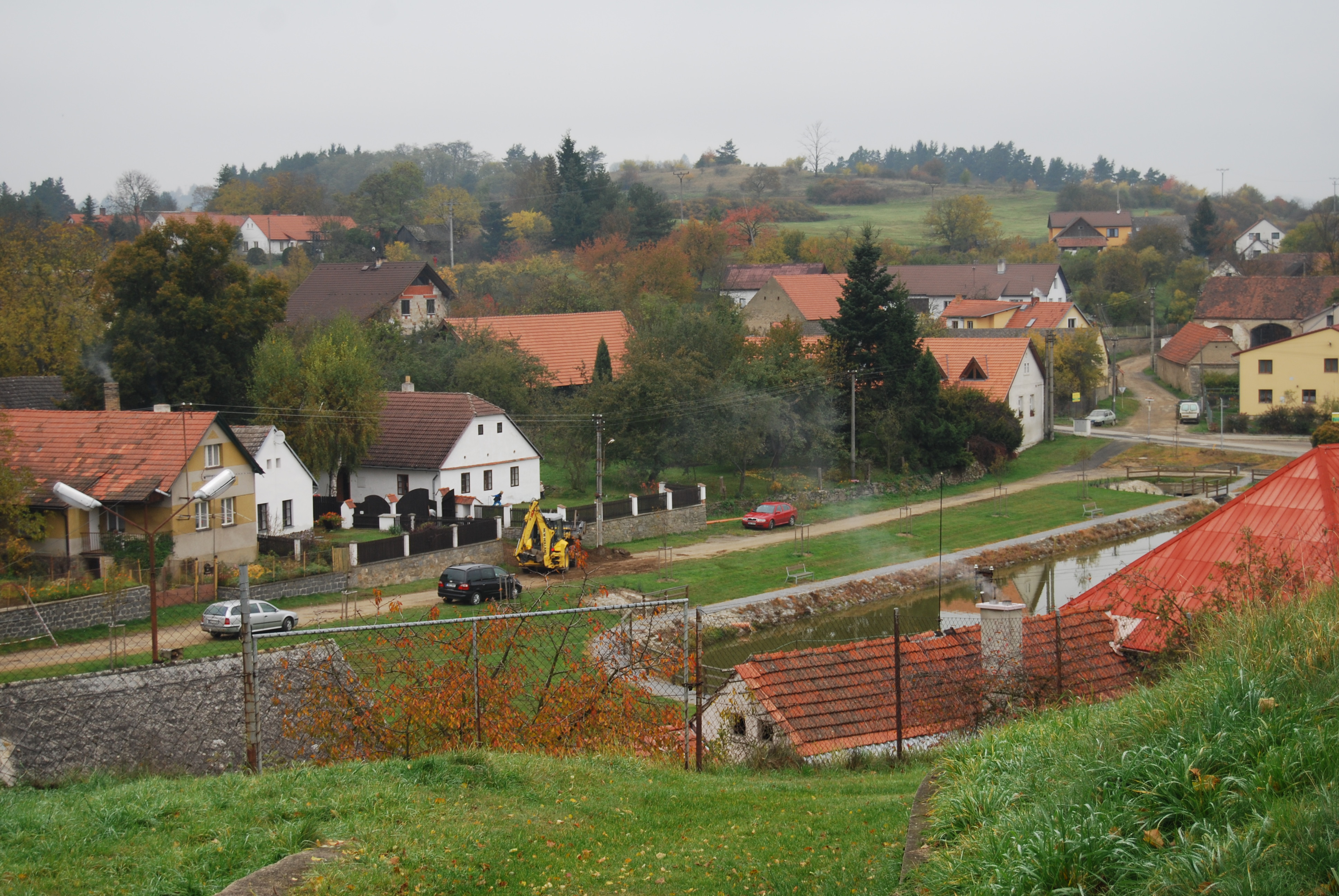 Pohled na část obce od kostela Nanebevzetí Panny Marie na vršku nad obcí. Obec Milešov v okrese Příbram, kraj Středočeský. Česká republika.